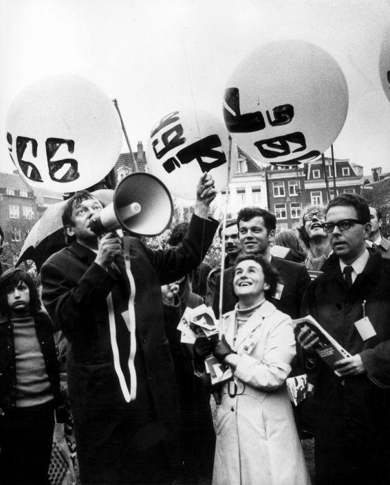 Hans van Mierlo tijdens een verkiezingswandeling door de binnenstad van Amsterdam. Hans van Mierlo, met megafoon, Anneke Goudsmit en Erik Visser (rechts), laten een aantal D '66-ballonnen op, op het grasperk van het Rembrandtplein. 24 april 1971.